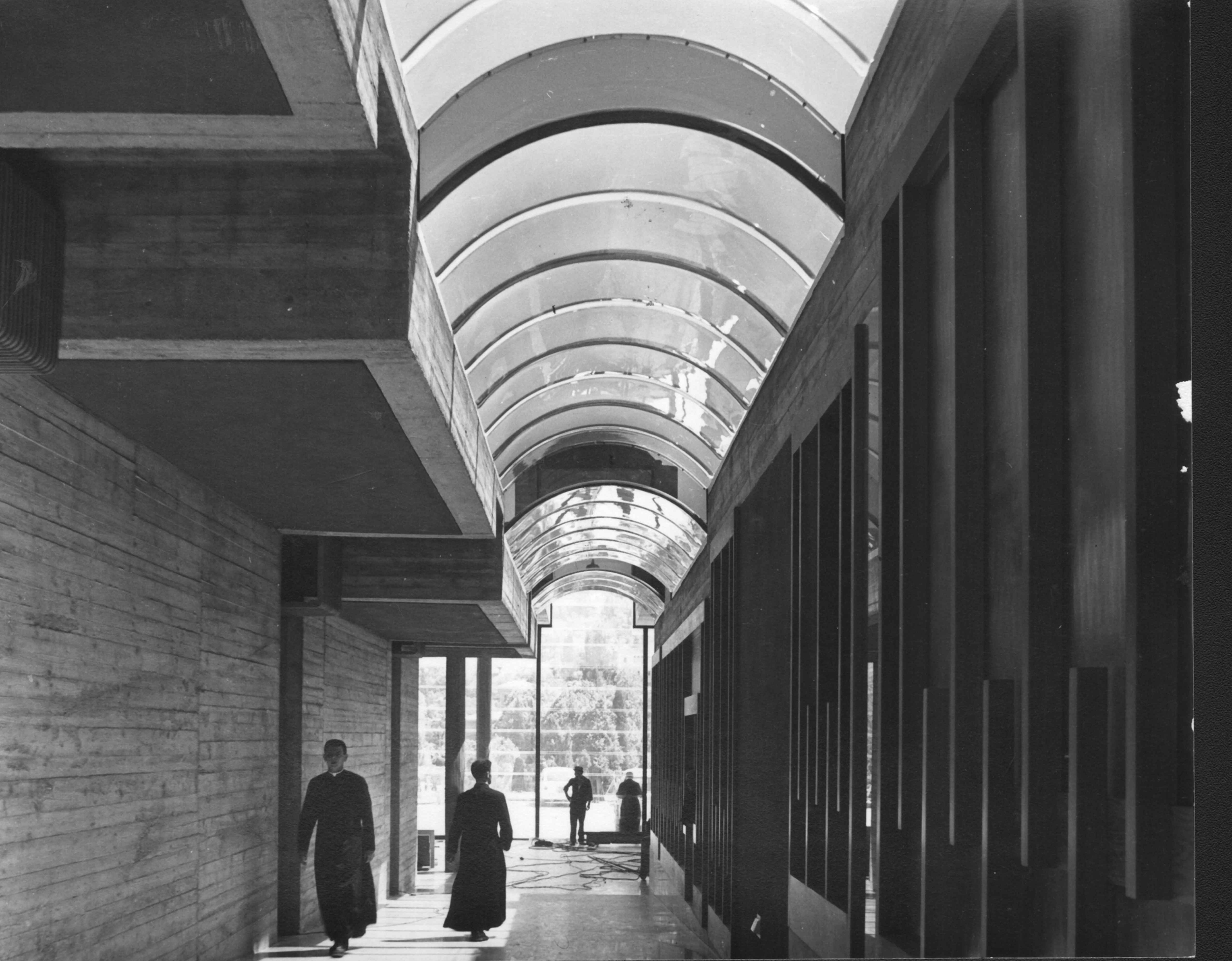 1960 - Seminario Benedetto XV